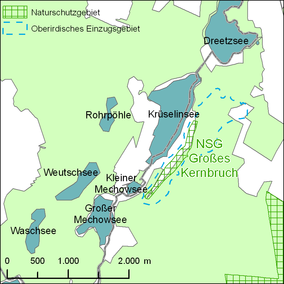 Karte Naturschutzgebiet „Großer Kernbruch“